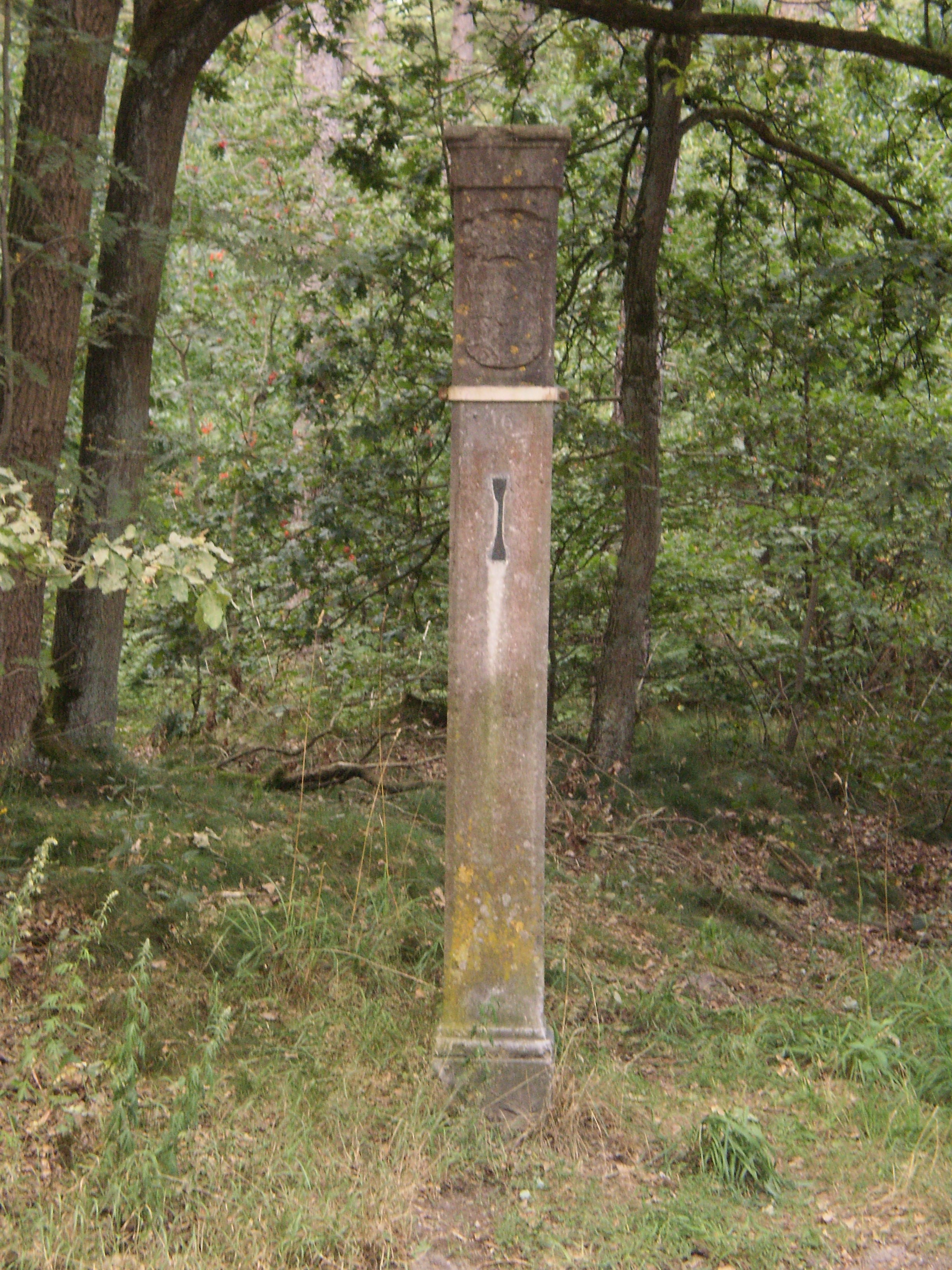 Oude paal die de grens markeert tussen de provincies Utrecht en (Noord-)Holland. Deze grenspaal met nummer 16 staat tussen Hollandsche Rading en Lage Vuursche ter hoogte van de kruising van de Vuurse dreef met de Hollandse sloot. Niet tot nauwelijks zichtbaar in de foto is het verweerde wapen van de provincie Utrecht. Provinciaal monument. Wellicht opgericht in 1719 en ook bekend onder de noemer leeuwenpaal.